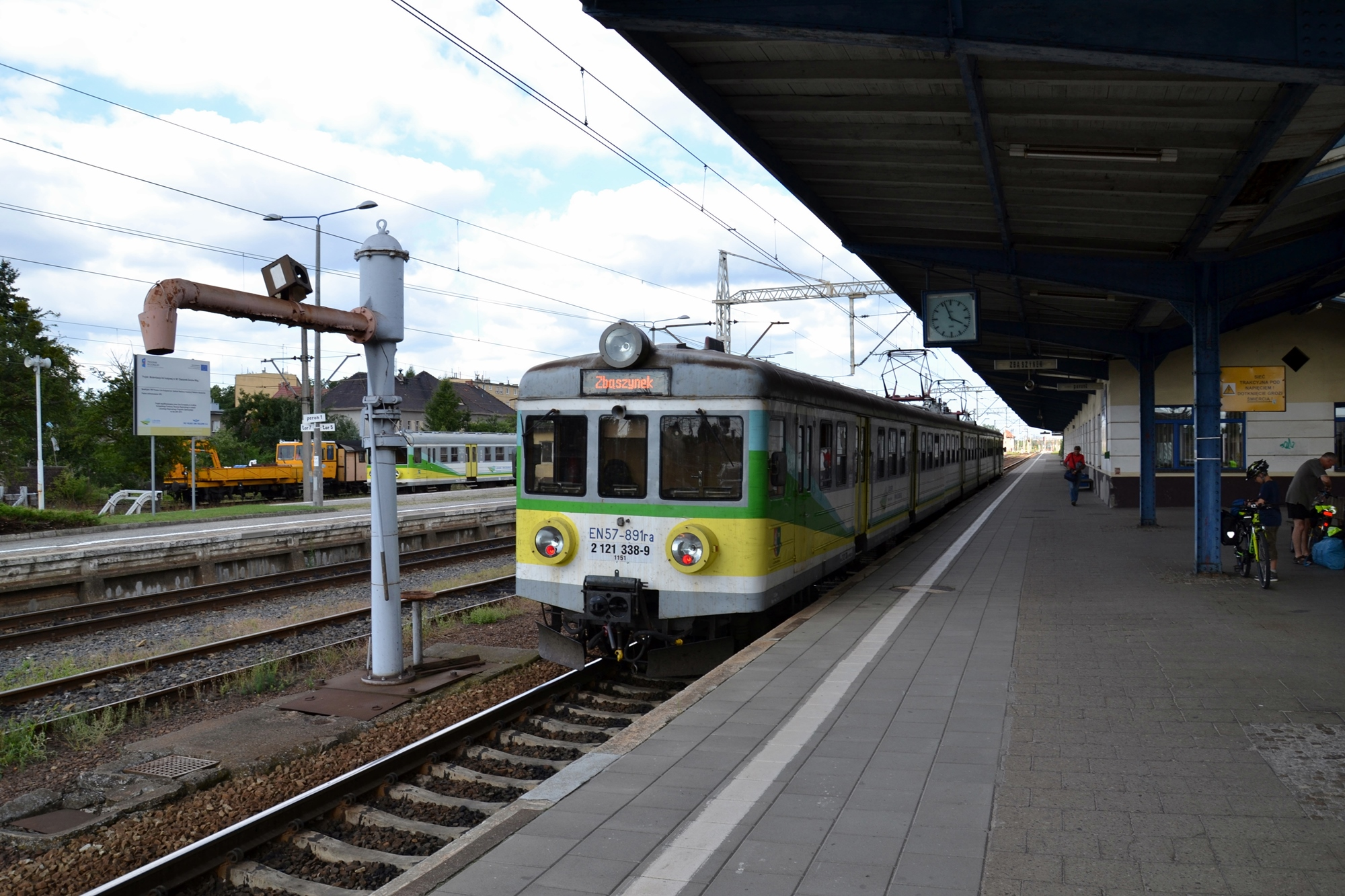 EN57-891 w barwach województwa Lubuskiego na stacji w Zbąszynku